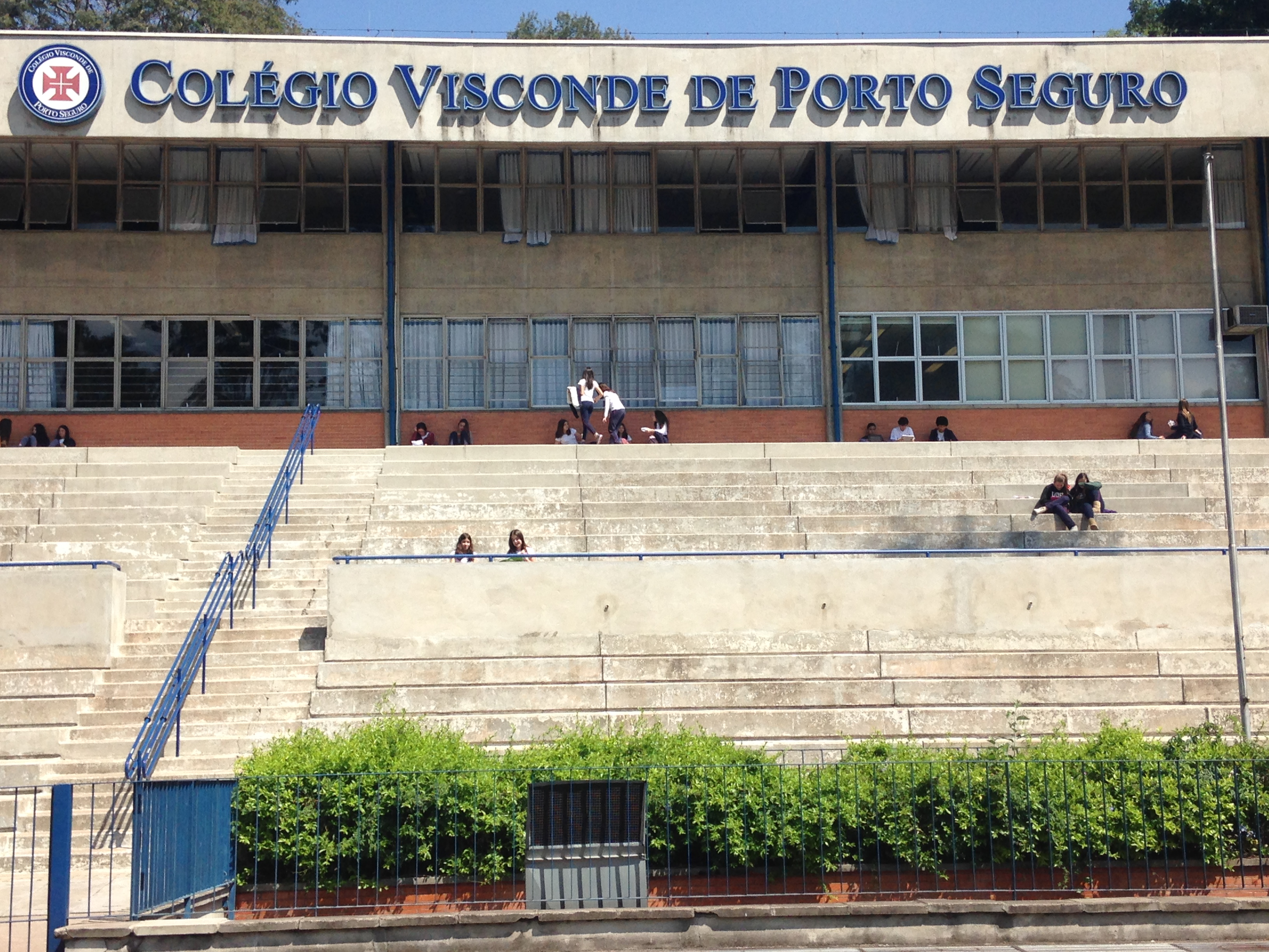 Fachada norte do prédio do Ensino Fundamental da unidade Morumbi, com o logo da escola. Está localizada na frente da quadra poliesportiva.